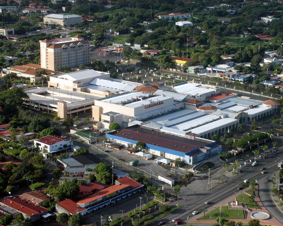 Metrocentro Managua Shopping Center